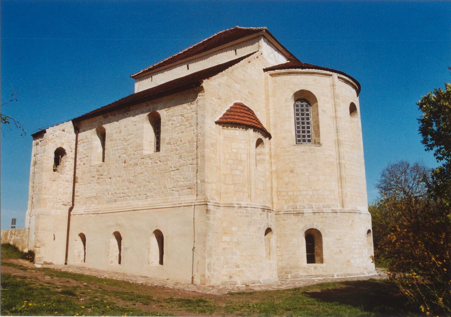 Konradsburg Chor der ehem. Klosterkirche